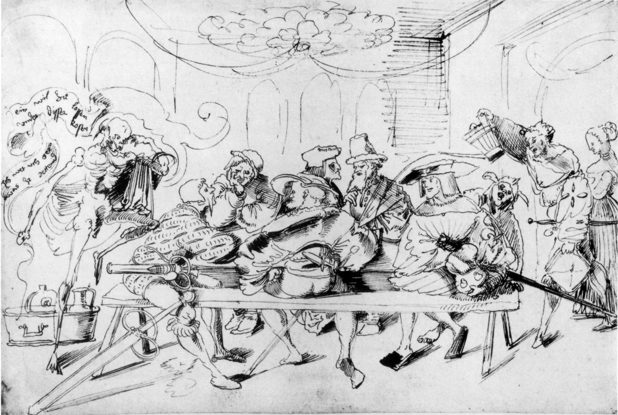 Die Werbung eines Landsknechts in einer Zunftstube. Am unteren Ende der Tafel in der Zunftstube sitzt ein französischer Werber, am oberen Ende, rittlings sitzt der Landsknecht. In der Mitte verfolgt ein Eidgenosse den Handel. Er trägt einen Schweizerdolch und einen Anderthalbhänder. Hinter dem Landsknecht steht der Tod, der im sein Knie in den Rücken drückt. Im Schriftband steht "Jch wet uch gern/ein wil zu lossen/was ir rettend vunder disser rosen" - "ich will euch gerne eine Weile zuhören, was ihr redet unter dieser Rose". Die Rose meint einerseits die geschnitzte Rose an der Decke, aber auch in Anspielung auf die Redewendung "unter Rosen reden" das Heraufbeschwören eines Unglücks durch unsinniges Geschwätz. Die Szene steht in Zusammenhang mit dem Abschluss des Soldbündnisses zwischen Frankreich und der Eidgenossenschaft am 5. Mai 1521 bzw. dem Beginn der Anwerbung deutscher Landsknechte durch Frankreich im Juli 1521. Die Eidgenossen befürchteten, die Landsknechte würden sie auf dem Schlachtfeld verraten. Federzeichnung mit schwarzer Tusche, 21,3 x 32 cm